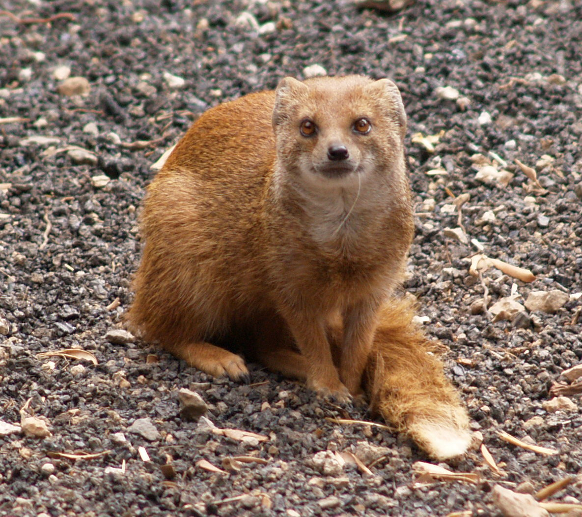 Cynictis penicillata